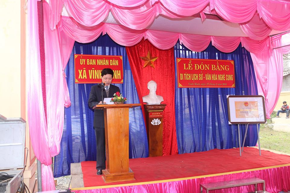 Nghè Cung